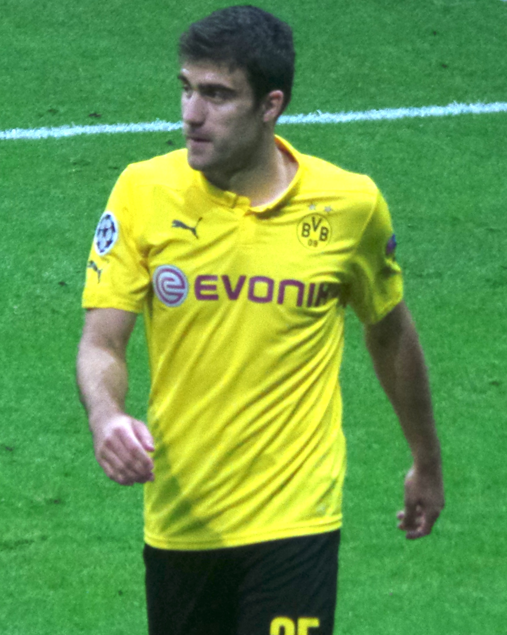 Sokratis Papastatopulos